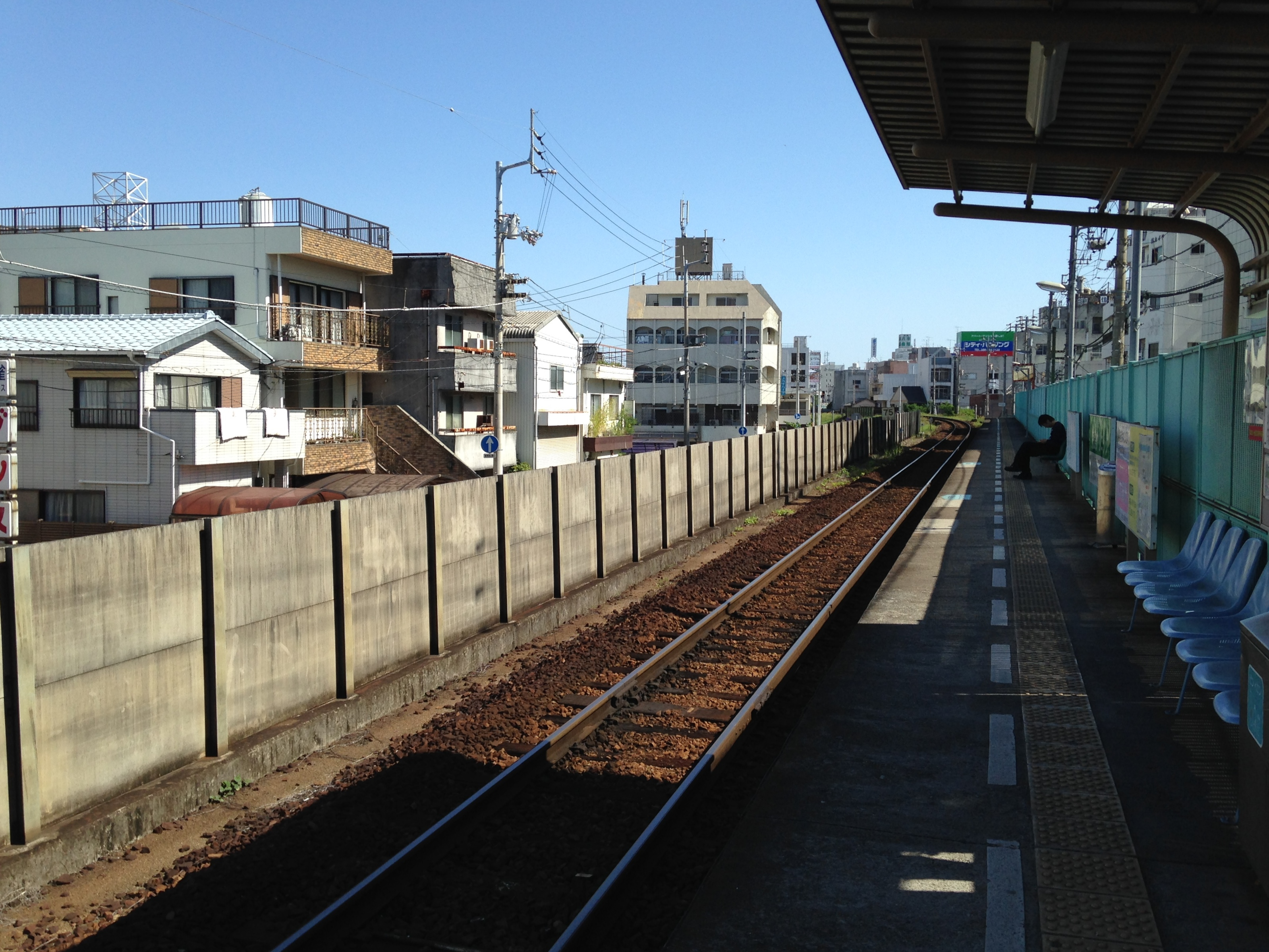 阿波富田駅のホーム(奥は徳島方面)